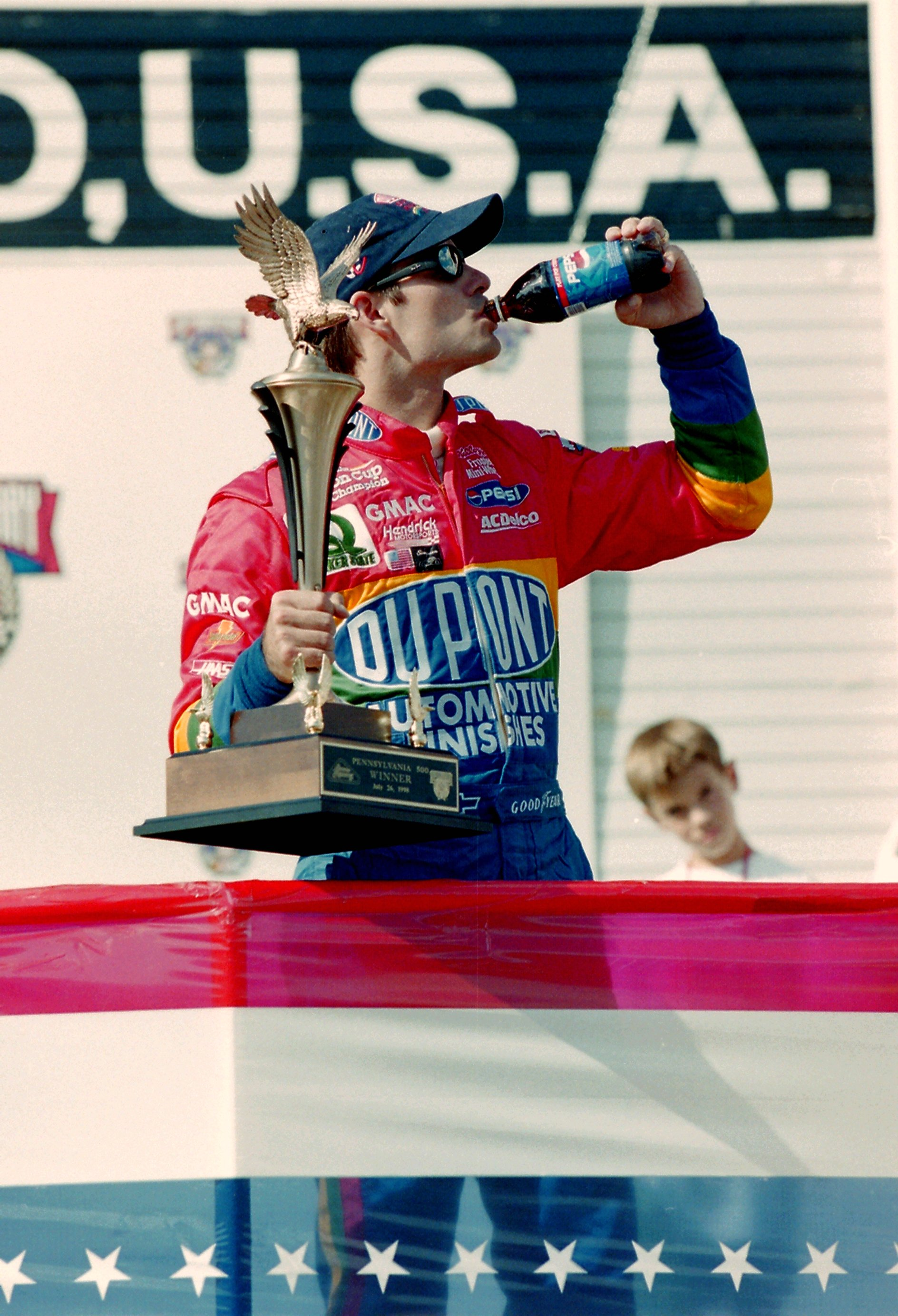 Pennsylvania 500 1998